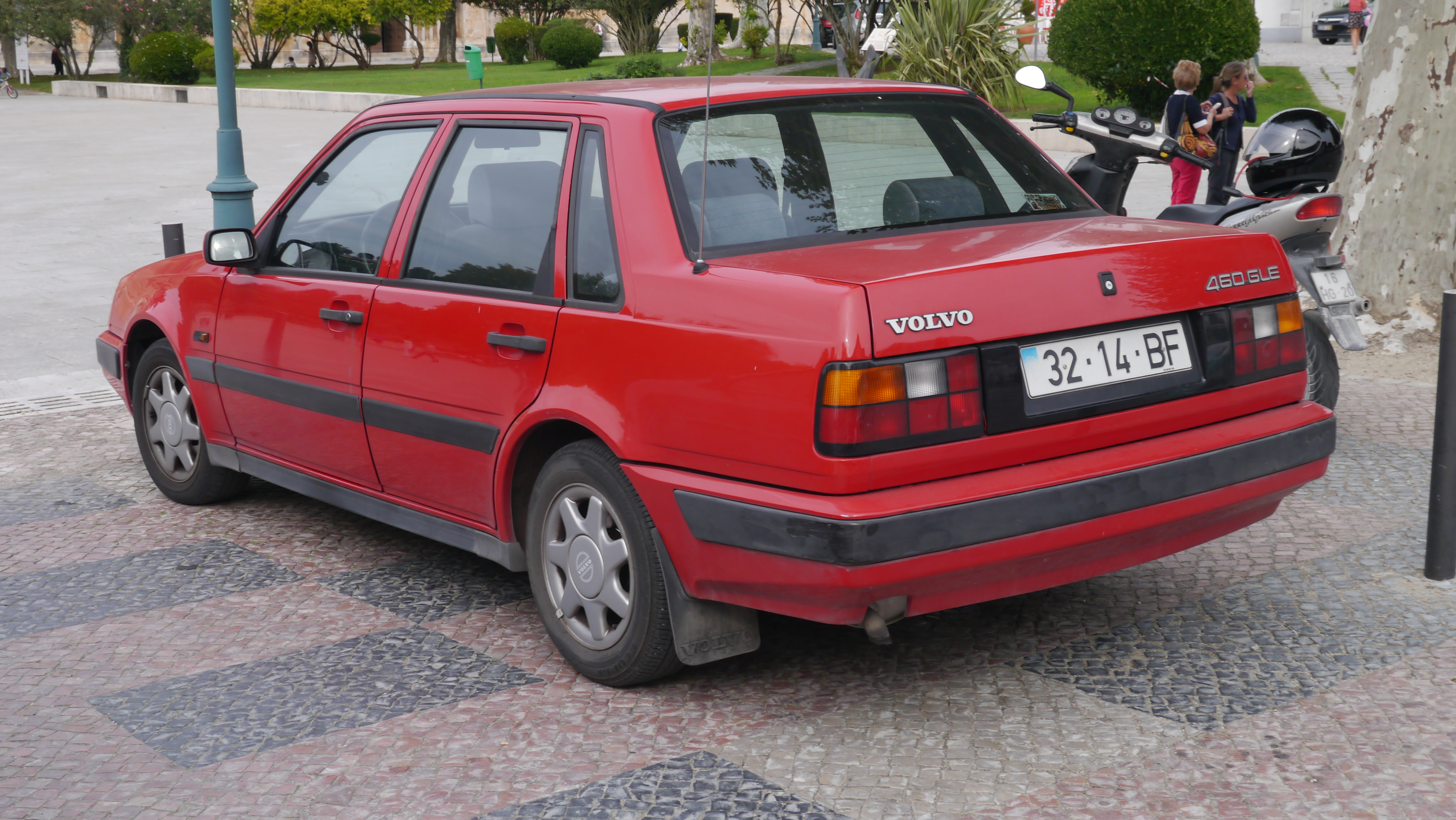 Batalha, Portugal.